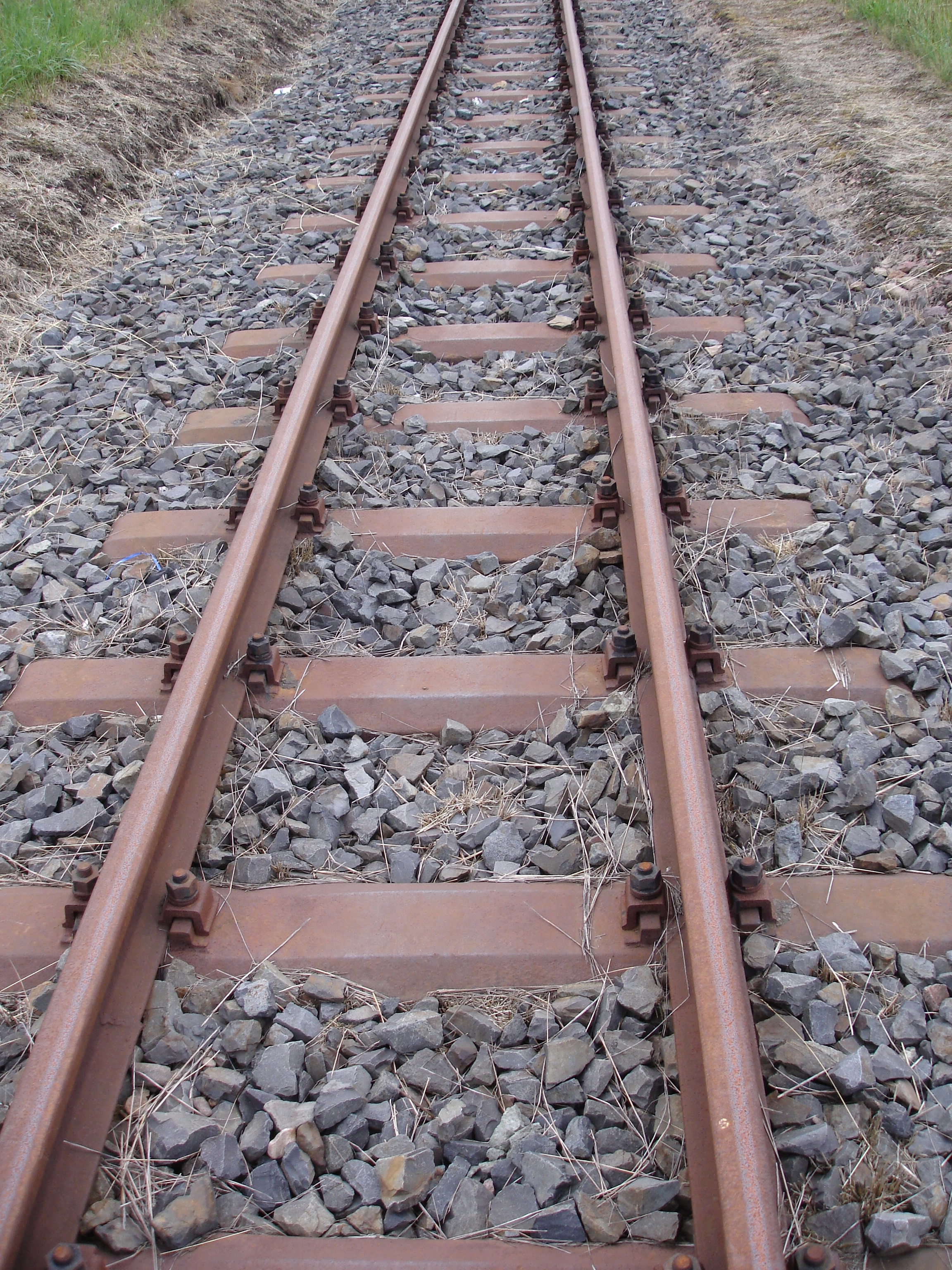 Schmalspurgleis in Obercarsdorf